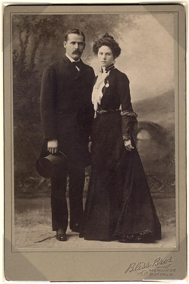 Sundance Kid med sin fru 1901, nygifta. Detta kort togs i januari 1901 hos DeYoung Photography Studio, som låg på 826 Broadway i New York City och är antagligen ett bröllopskort. Därefter utgjorde kortet (originalet) en del av Pinkertons Detektivbyrås hemliga arkiv.